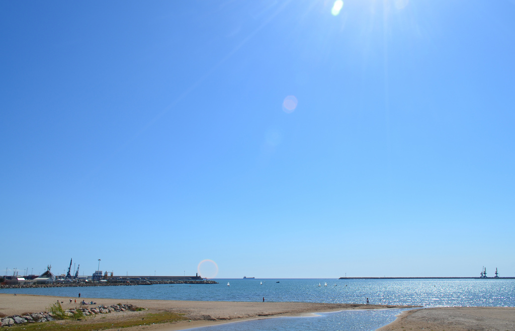 Día de primavera (original)